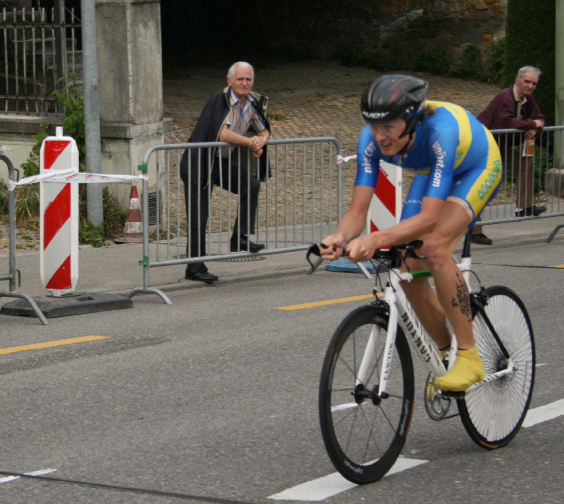 Gustav Erik Larsson prologue du Tour de Romandie 2007